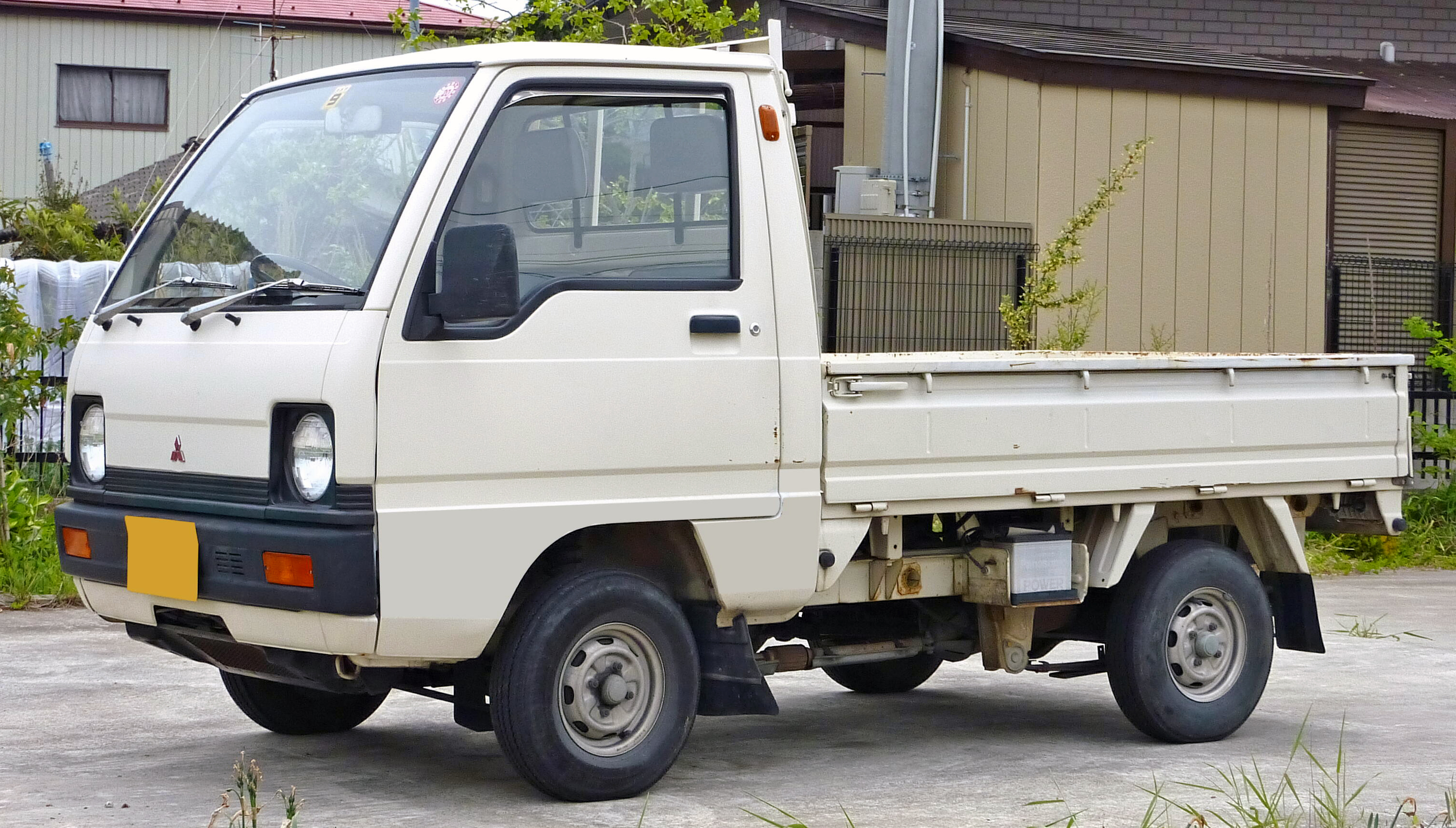 三菱・ミニキャブトラック（4代目：中期型）